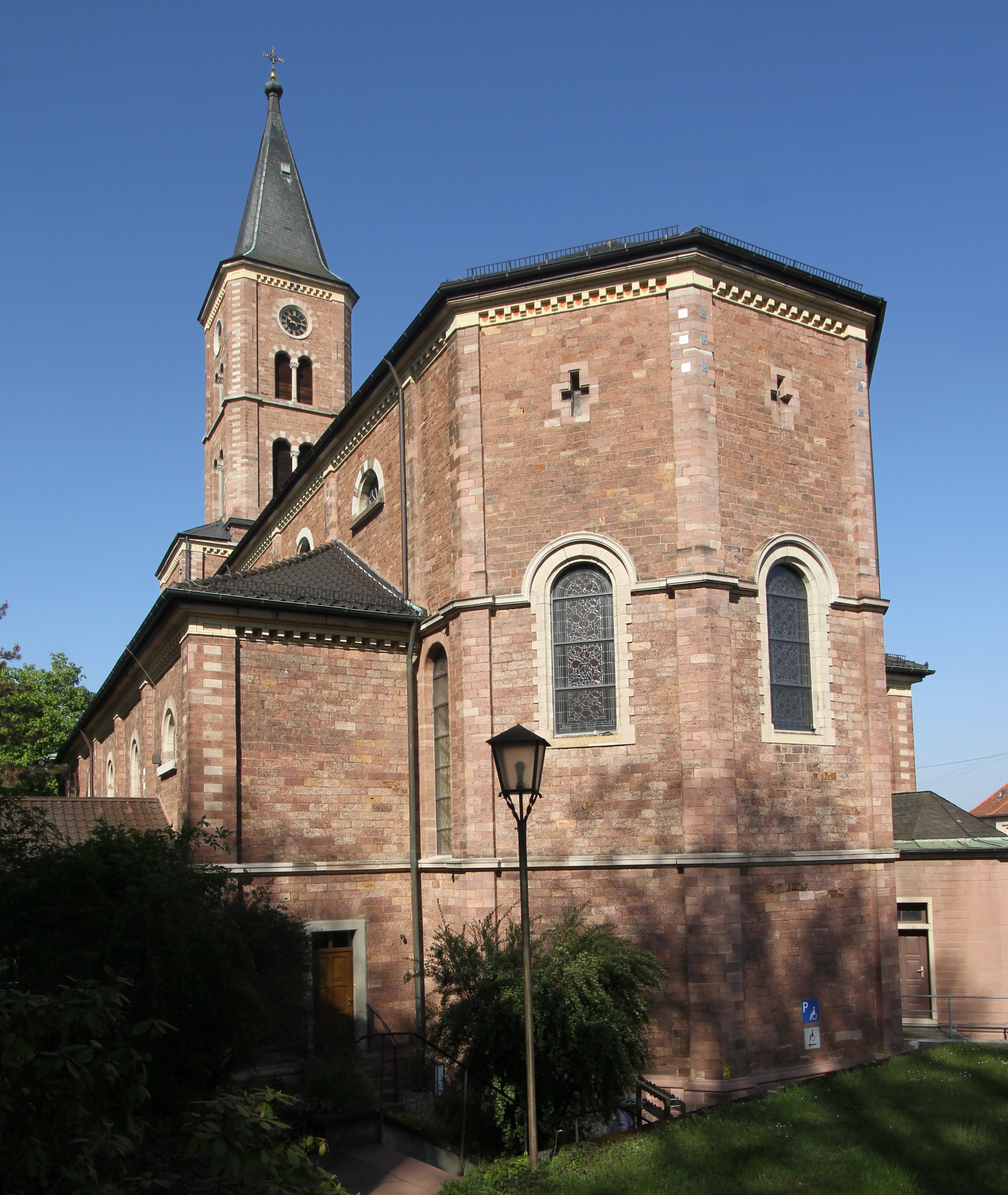 Kath. Kirche St. Dionysius in Baden-Baden-Oos